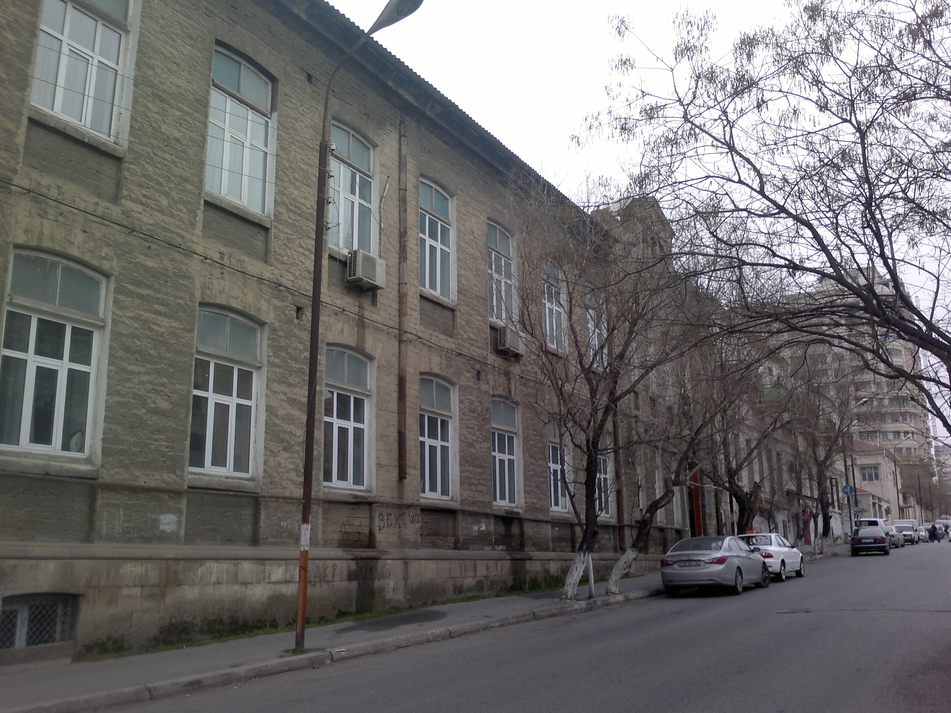 School of Arts named after Vagif Mustafazade